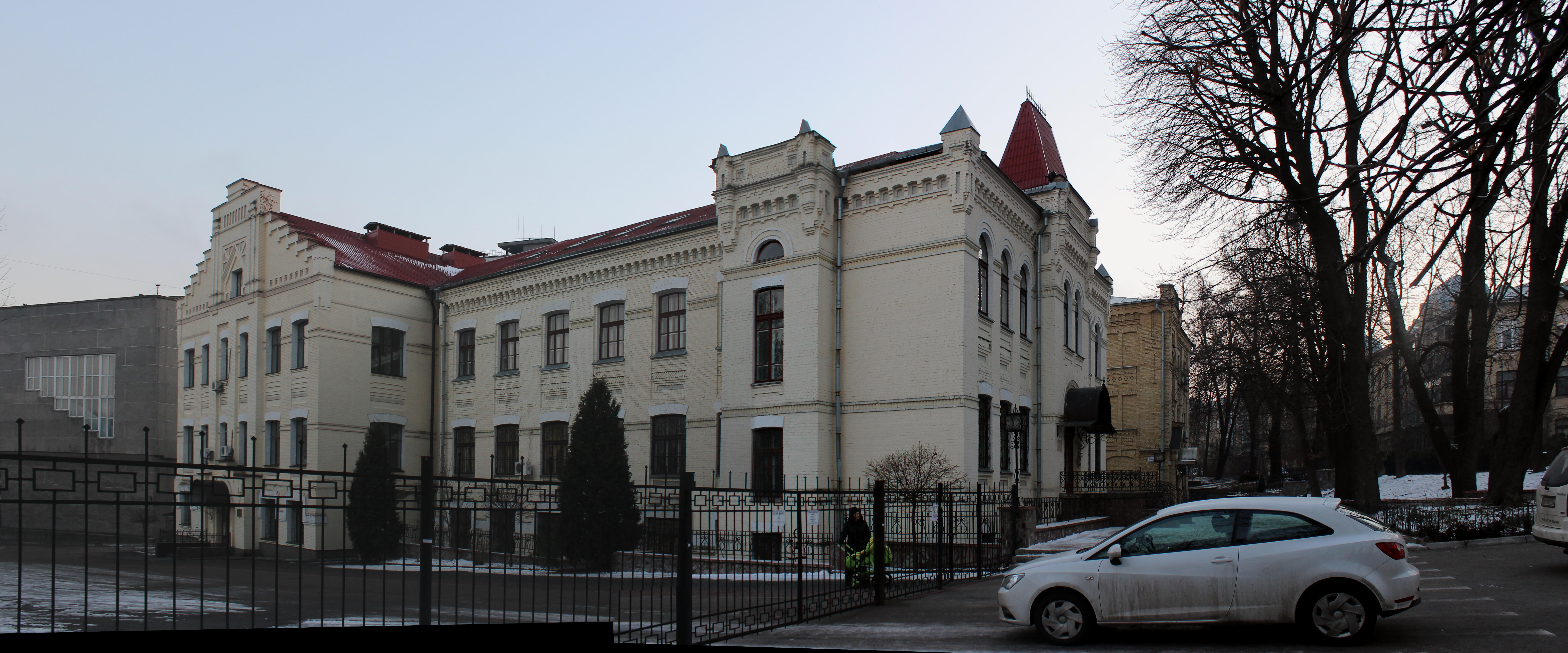 Їдальня, якою з 1909 року опікувався комітет Товариства допомоги нужденним студентам, влаштовувалися студентські зібрання і засідання «Професорського клубу», Київ, Перемоги просп., 37